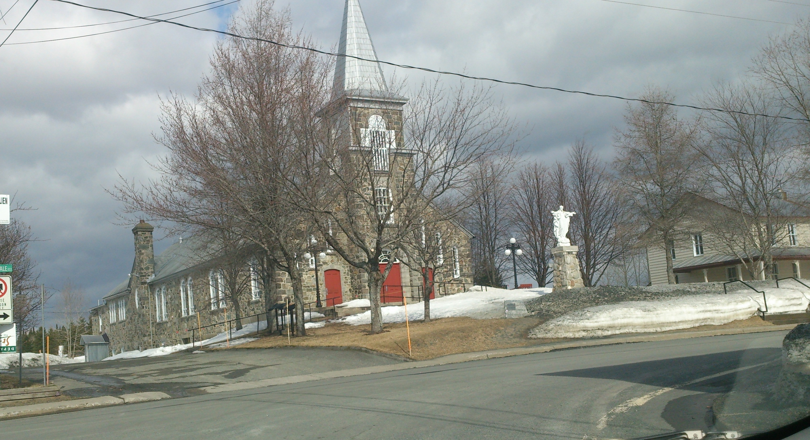 Église de Saint-Luc-de-Bellechasse construite en 1936